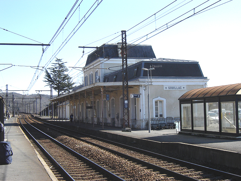 La gare SNCF de Souillac (Lot), France